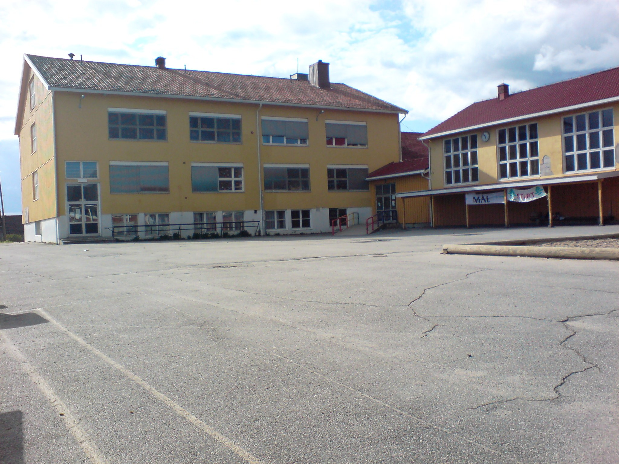 Løken skole i Aurskog-Høland kommune.